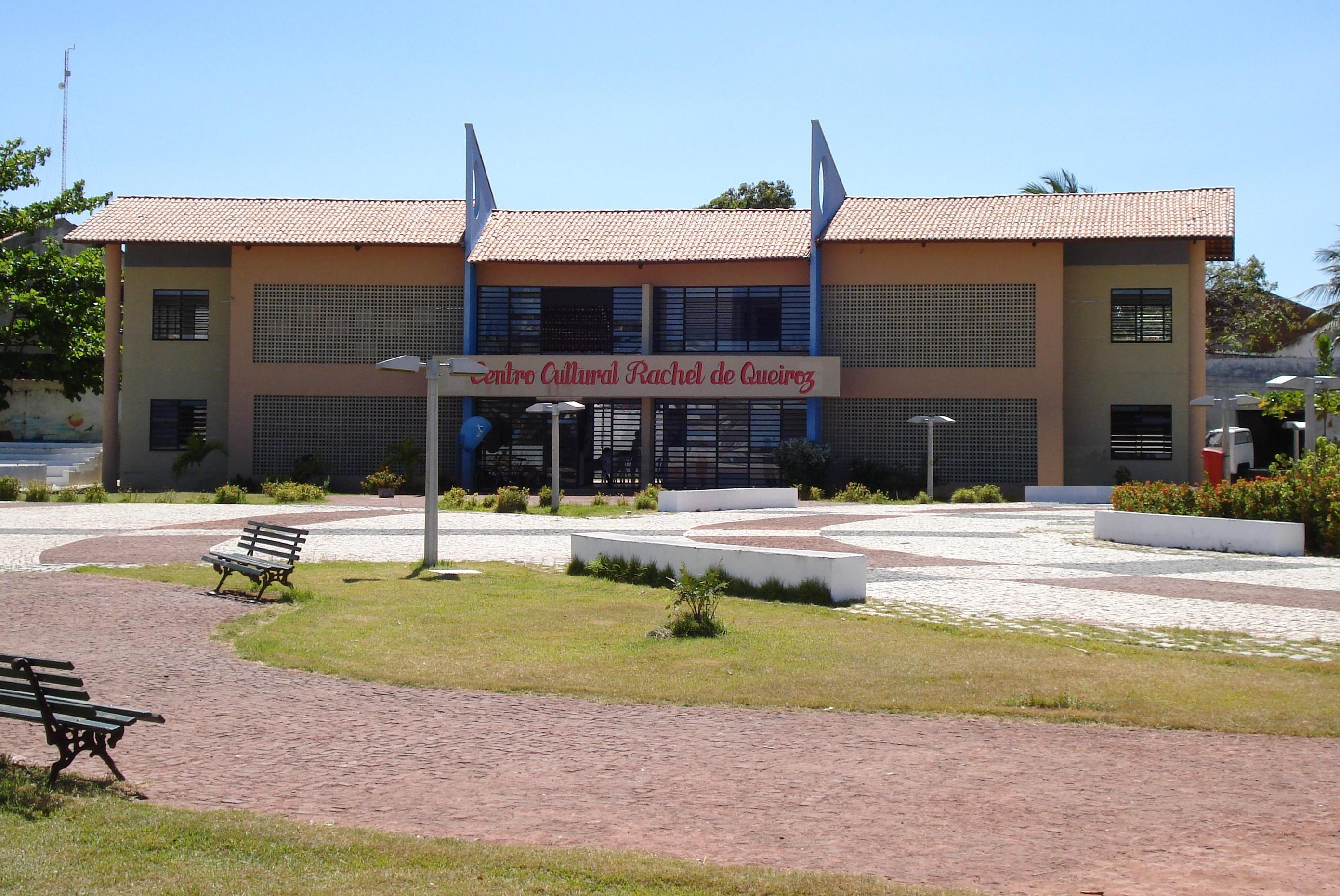 centro cultural Rachel de Queiroz. Está situado ao lado do chalé da Pedra em Quixadá, ceará, Brasil.